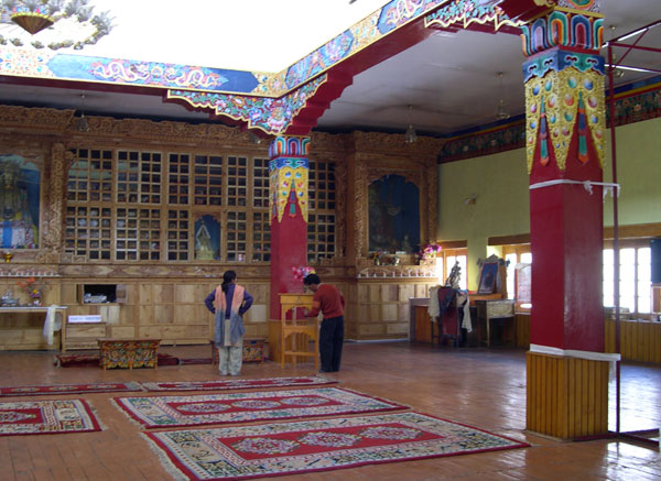 Leh. Gompa Soma (Ladakh, Índia)